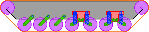 En enkel bild som ska förklara en grundläggande uppsättning av ett larvband. I detta larvband finns både boggi-upphängning och torsionsstavsupphängning som exempel på olika upphängningar.